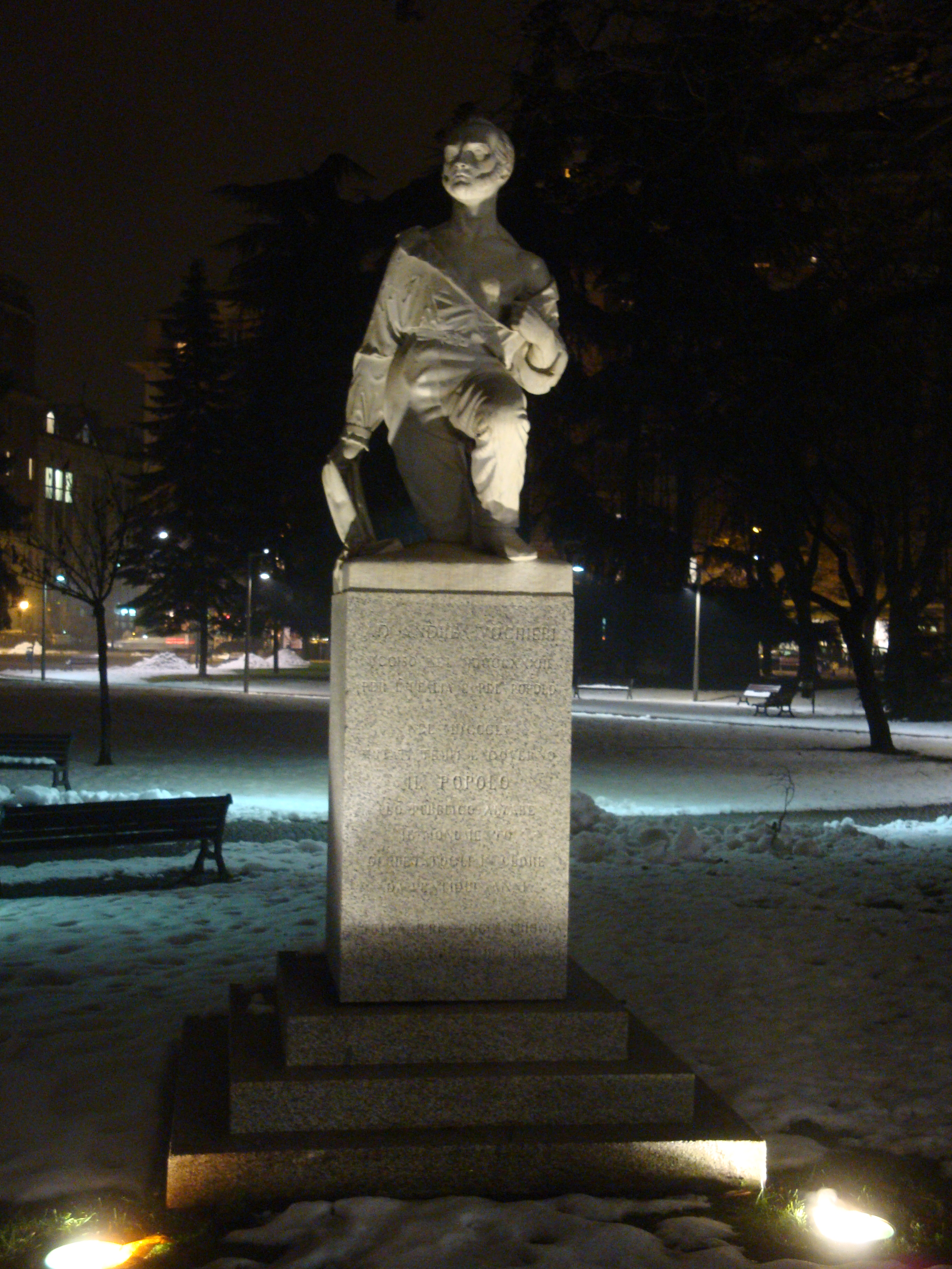 Busto di Andrea Vochieri ad Alessandria